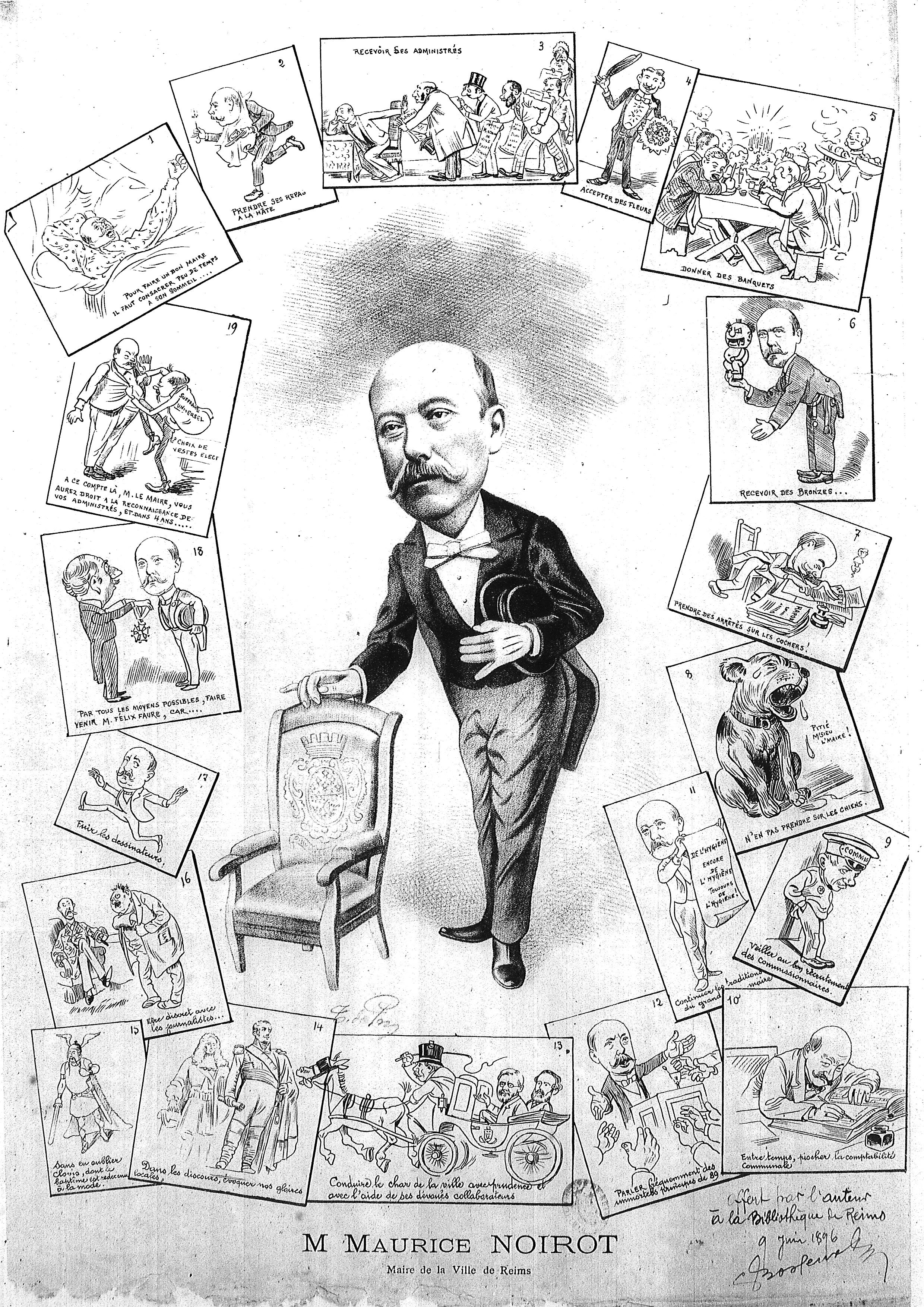 issu de la bibliothèque de reims section pesonnalités rémoises.